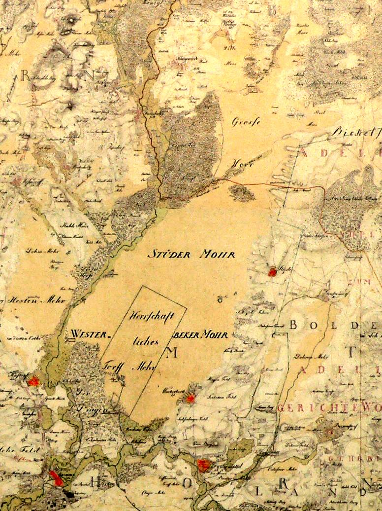 Grosses Moor Gifhorn Karte 1780 aus der kurhannoverschen Landesaufnahme 1779/1780. Mit den Orten rund um das Moor von links nach rechts: Kästorf, Gifhorn, Dannenbüttel , Westerbeck, Stüde